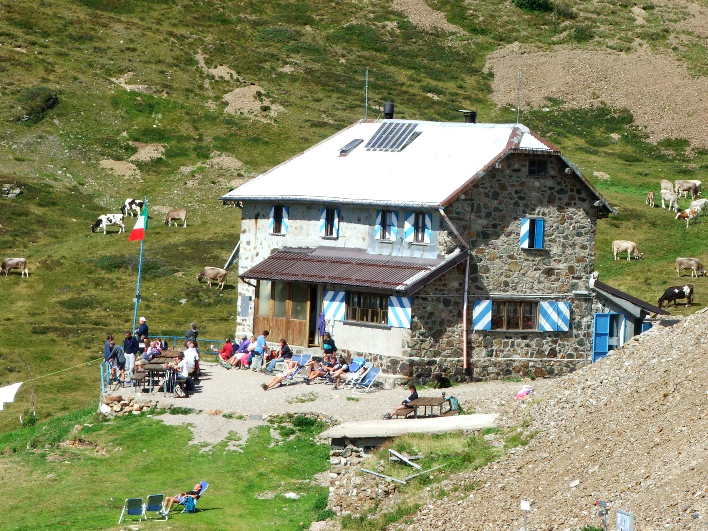 Rifugio Grassi, Orobie.